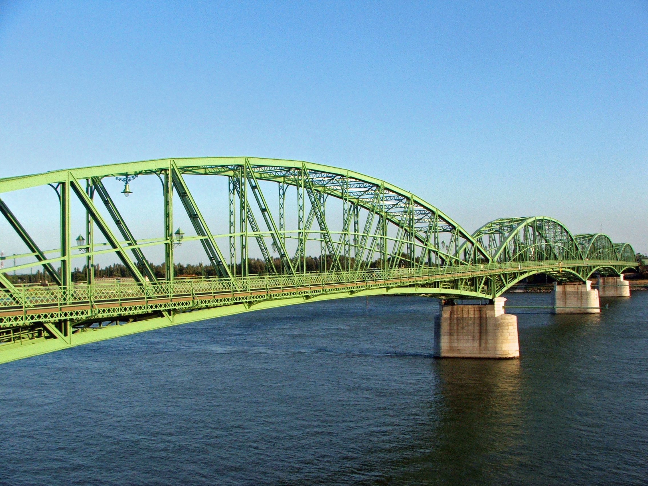 Elizabeth bridge, Komárom